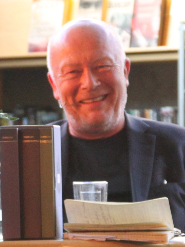 Nils Ole Oftebro på kirkemøtet i 2012